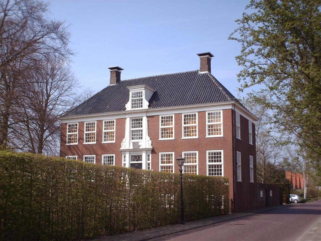 Osinga State in Langweer